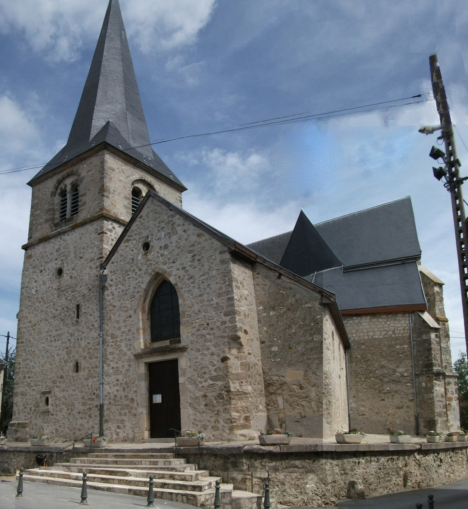 Église_de_Rilly-la-Montagne, vue depuis le parvis.